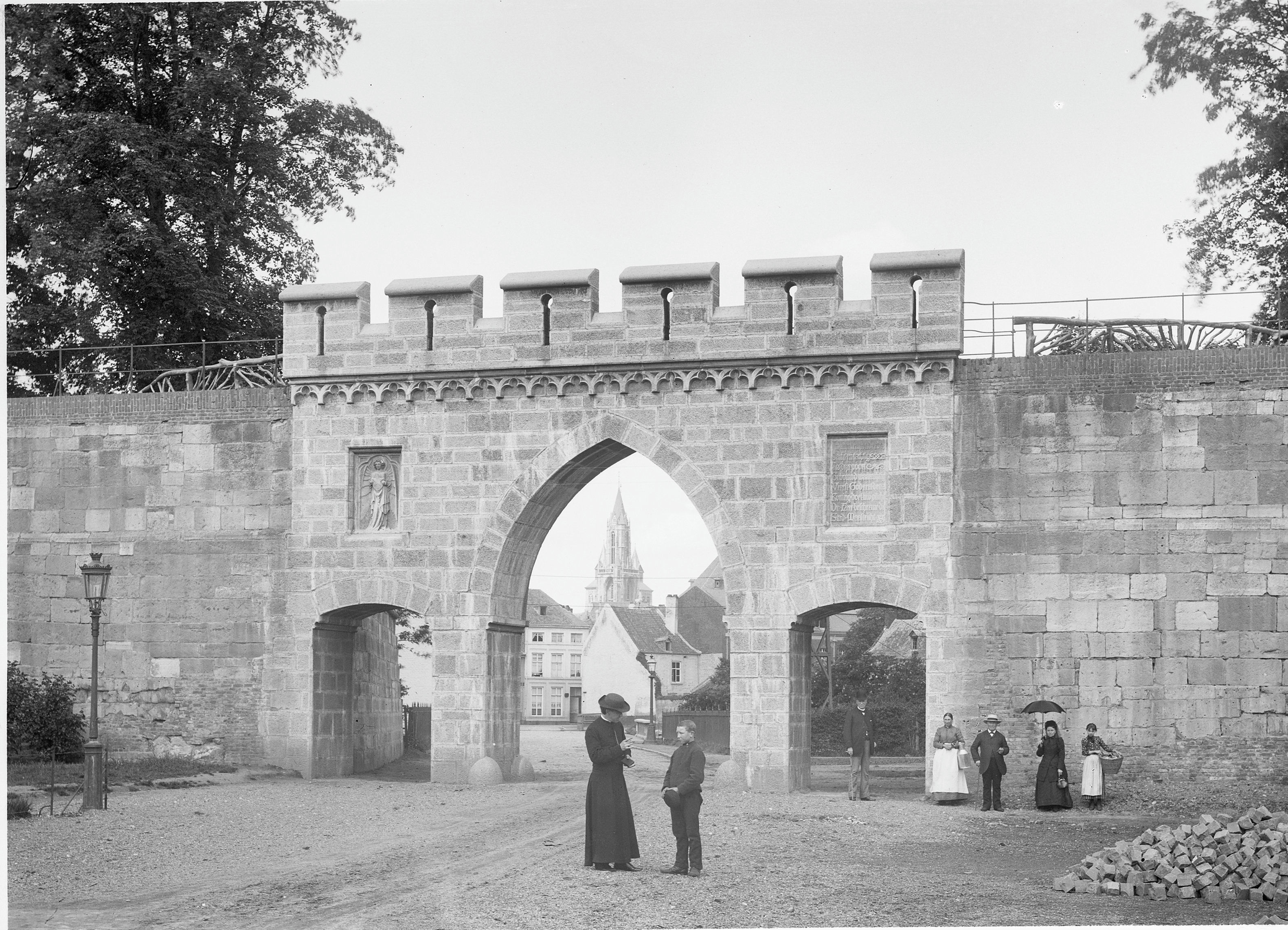 Poorten, Diversen: Poort genaamd "Waarachtig"